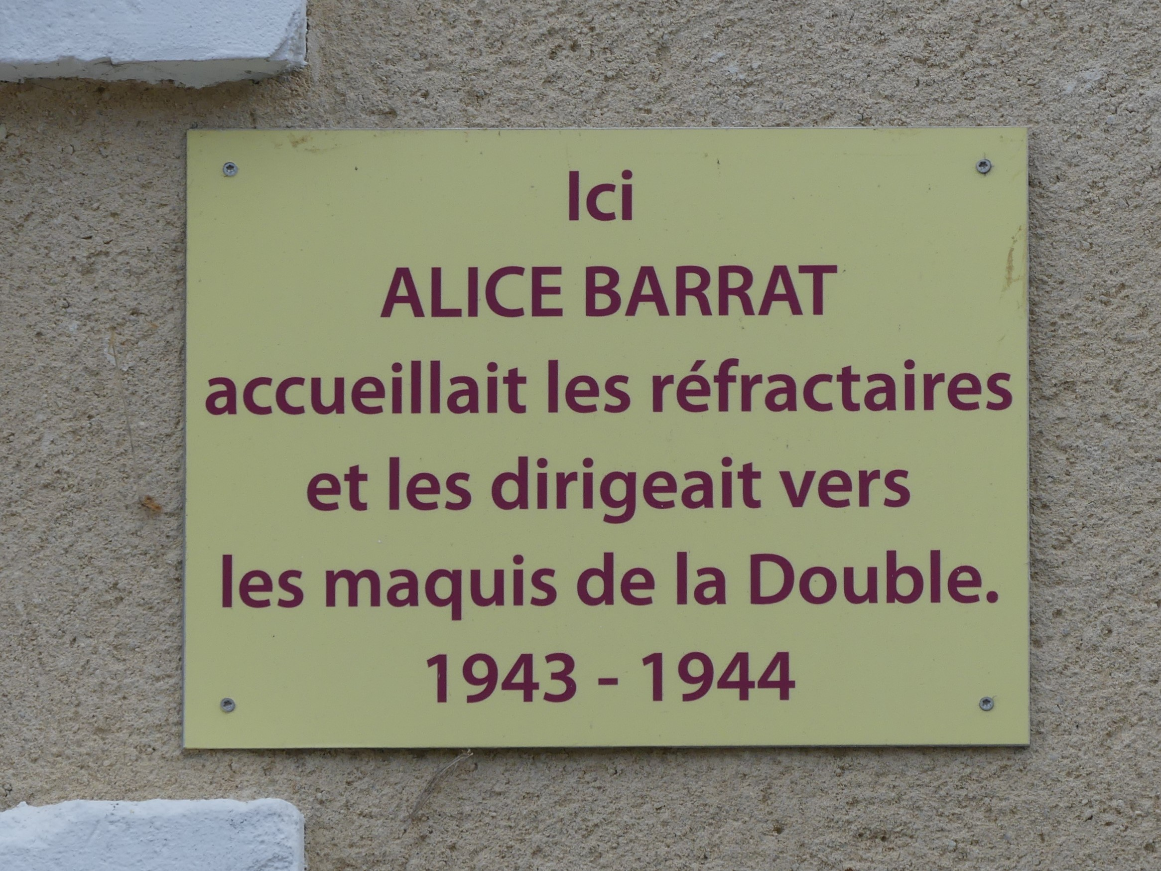 Plaque apposée sur le restaurant Barrat à Saint-André-de-Double, Dordogne, France.